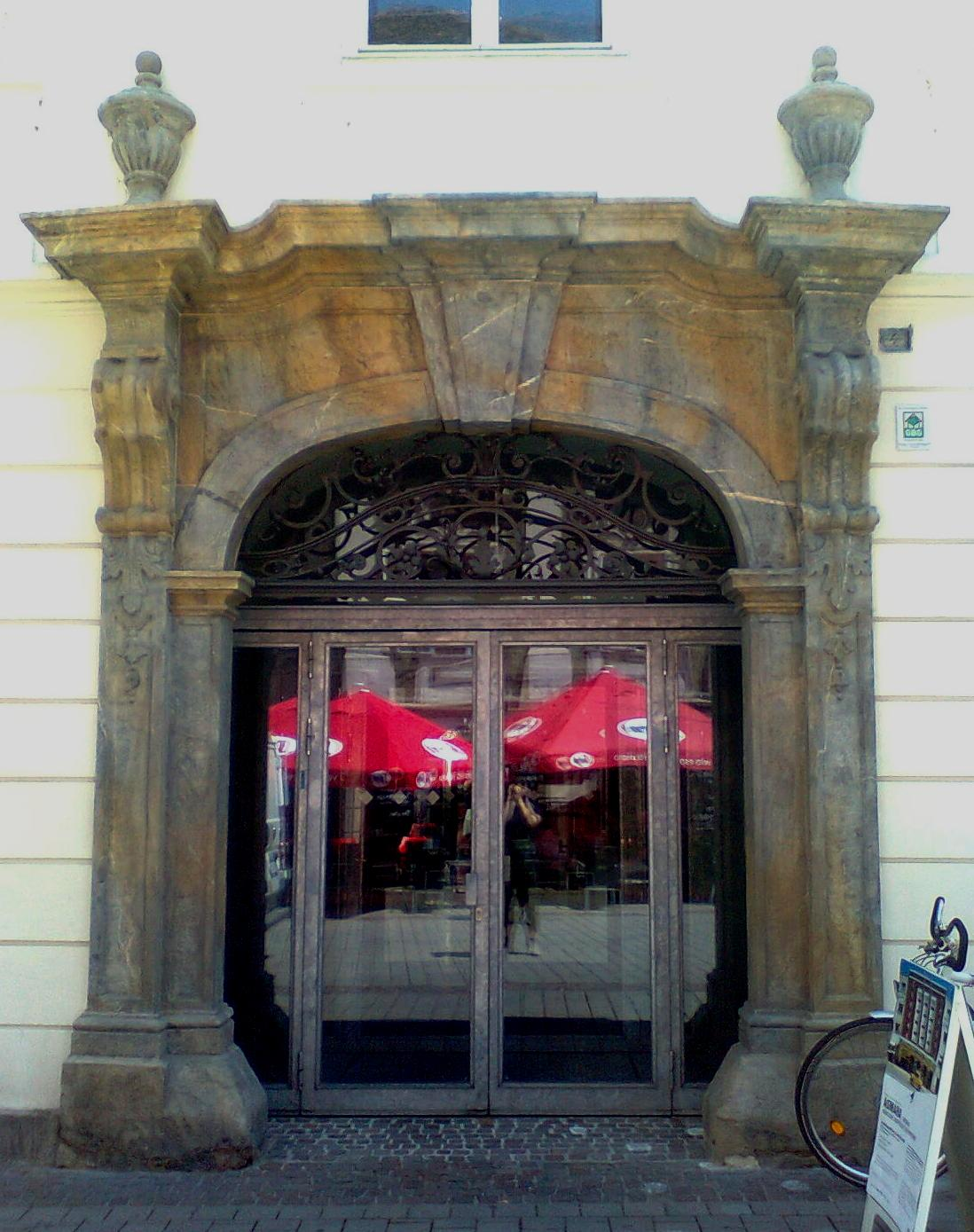 Portal des Palais Thinnfeld in Graz